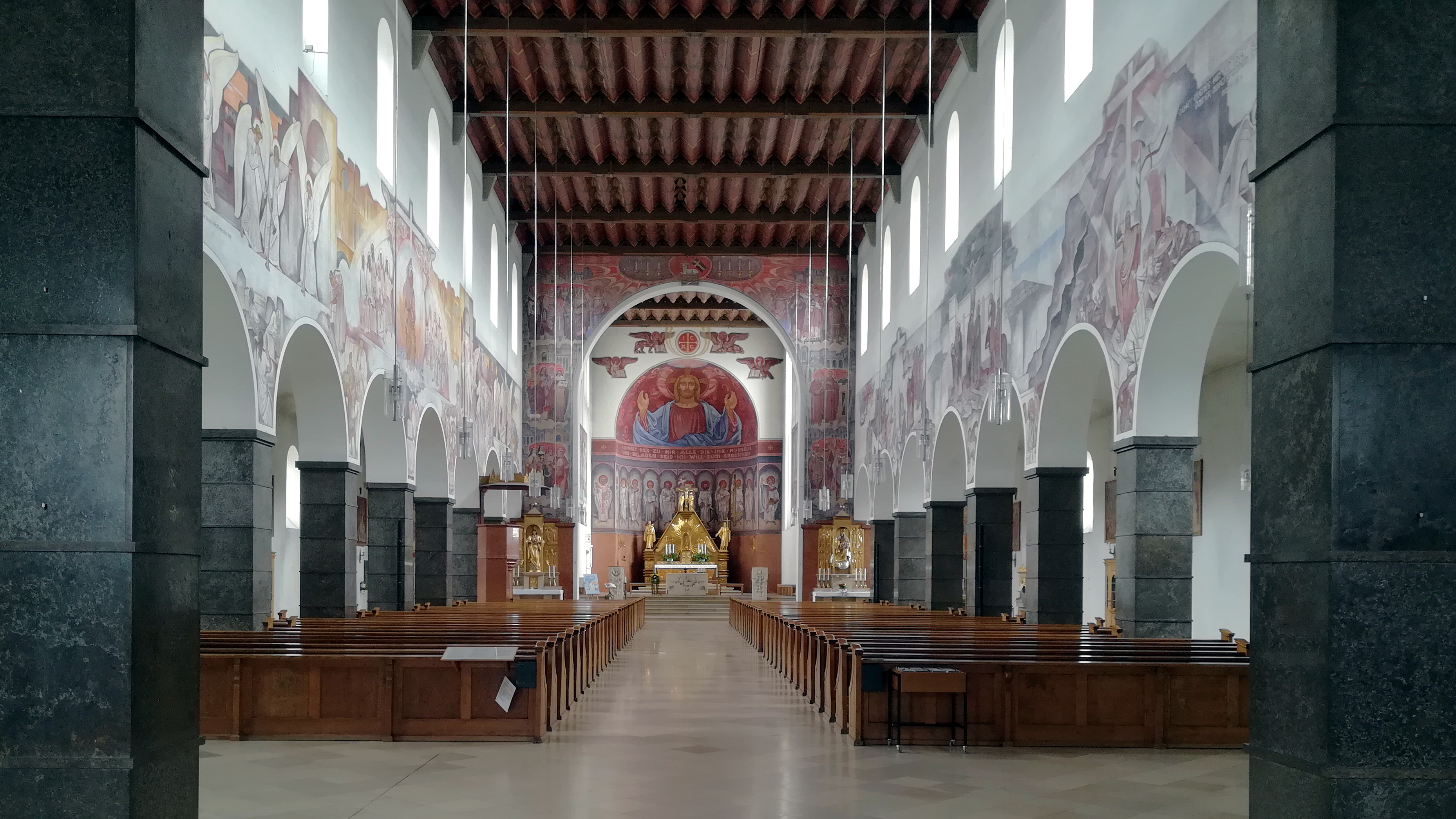 Die denkmalgeschützte katholische Pfarrkirche St. Anton steht in der Furtmayrstraße 22 im Kasernenviertel von Regensburg.